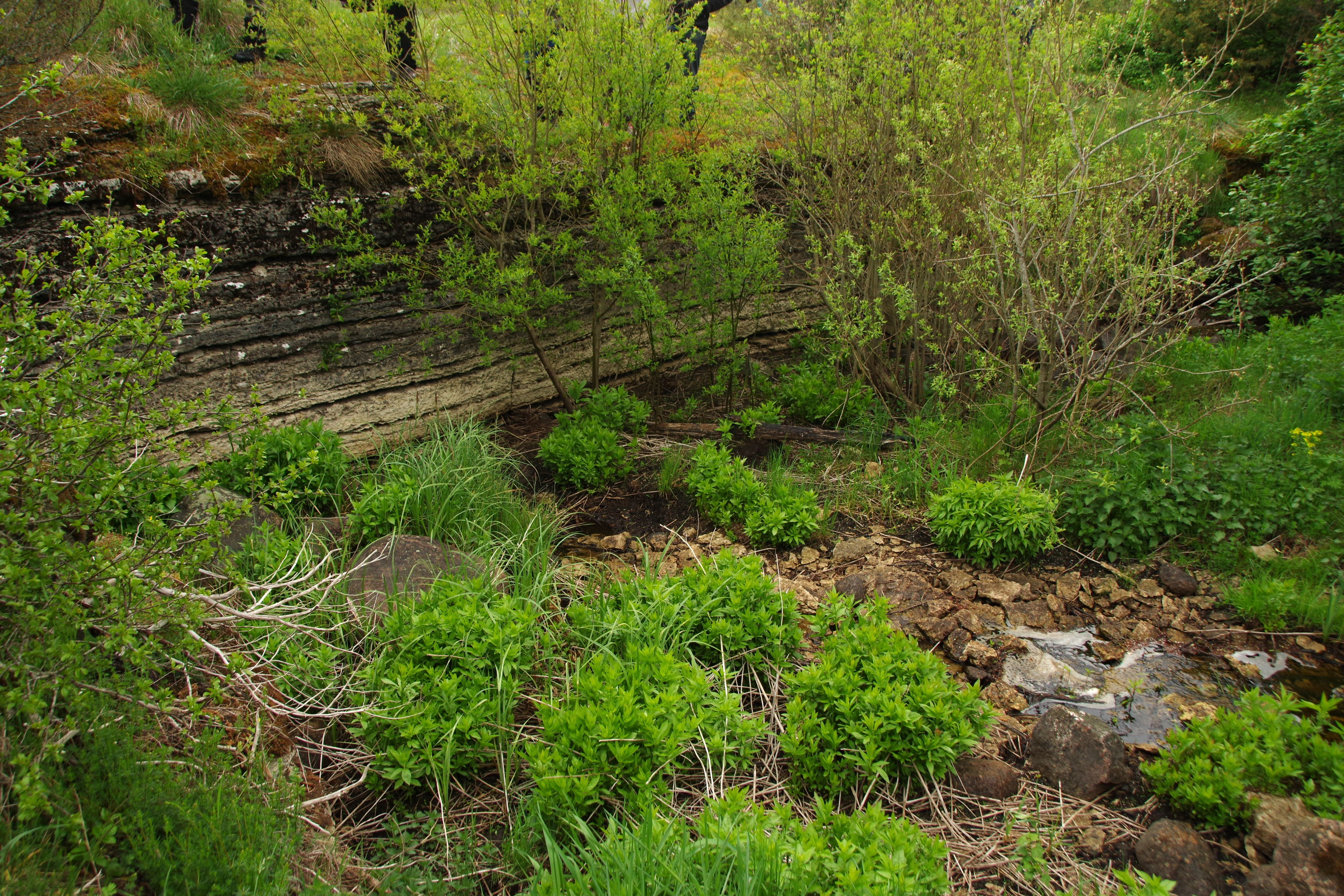 Vääna kurisu on kurisu Harju maakonnas Harku vallas.